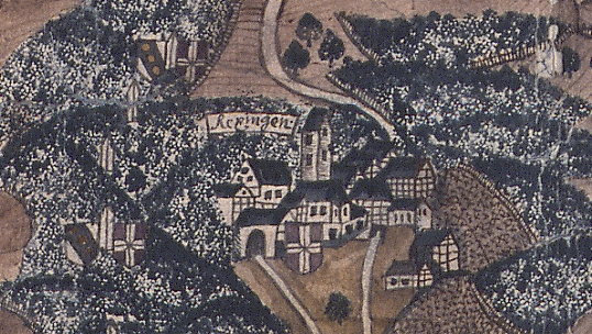 Rexingen, Ansicht um 1605, Ausschnitt aus der Karte der Ritterschaftlichen Freien Pürsch in Schwaben am Neckar und Schwarzwald (Signatur: Staatsarchiv Sigmaringen K I Sch/1) eines unbekanntes Zeichners um 1605, 1705 kopiert von Johann Ulrich Stierlin, Zeugwart und Feldmesser auf Hohentübingen